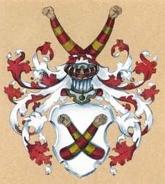 Wappen des gelderländischen ritterbürtigen Geschlechts Vijgh (auch: Vygh)